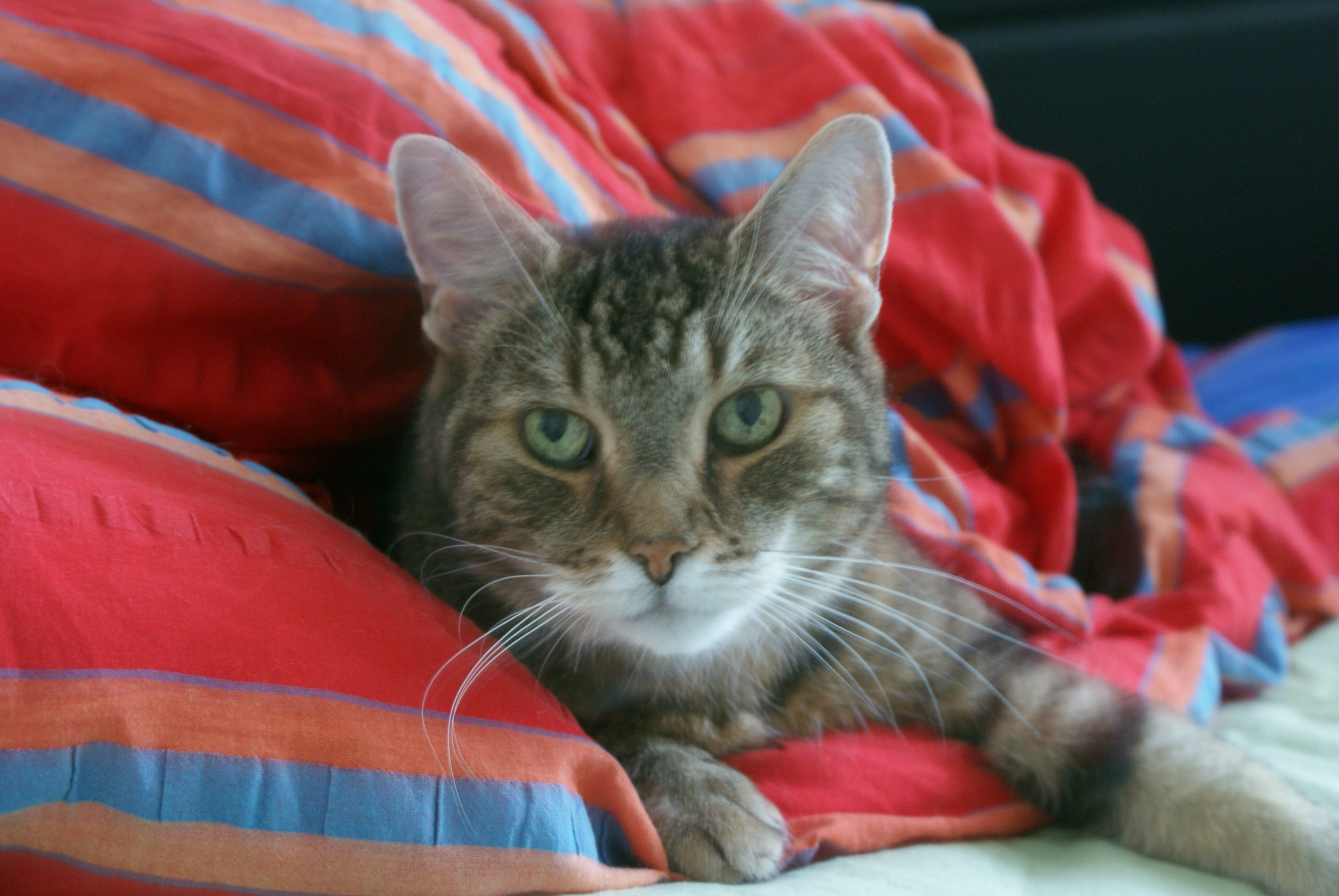 Kater Paul zu den beliebtesten Katzen im deutschsprachigen Web 2.0 (Facebook).